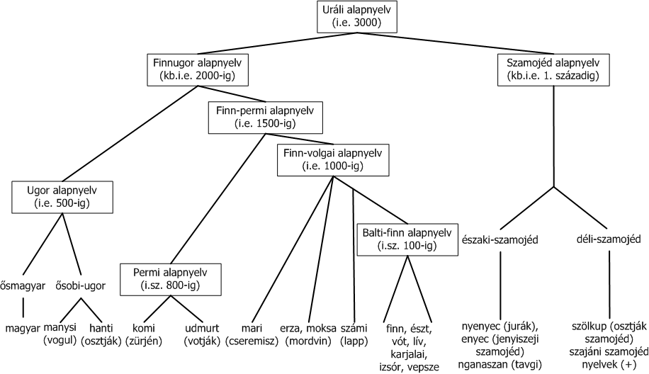 A finnugor nyelvek családfája